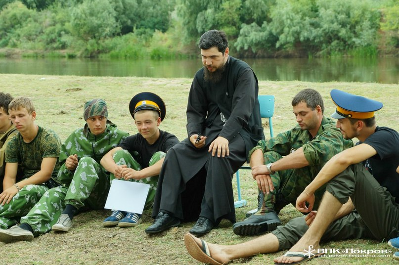 Беседа епископа Антония с молодыми казаками. Село Красный Яр одноименного района Астраханской области